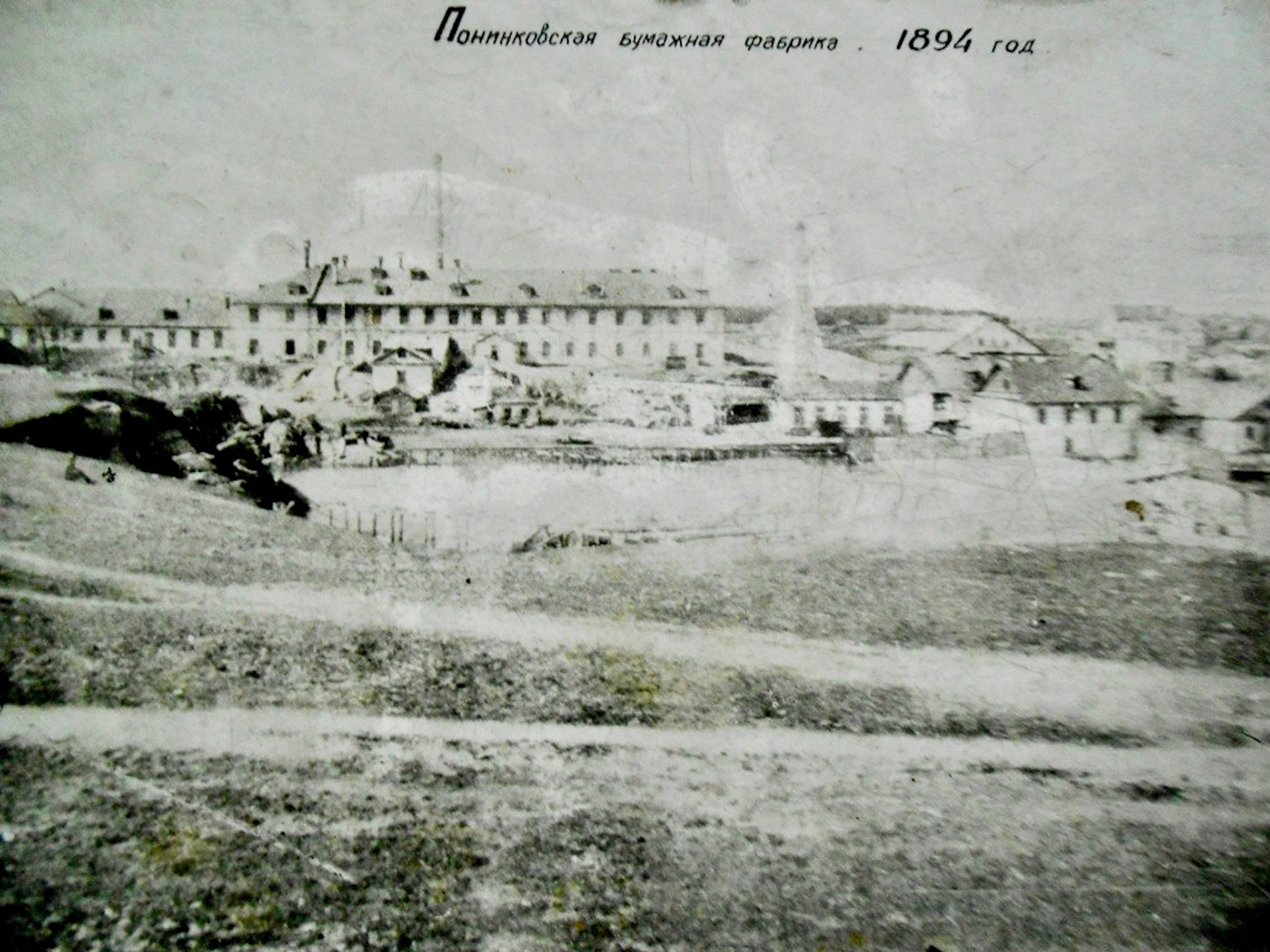 Понінківська Паперова Фабрика, 1894рік.